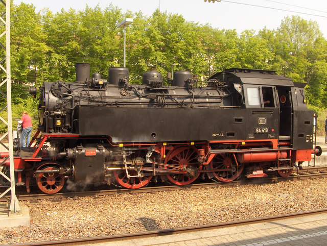 Dampflok in Marbach